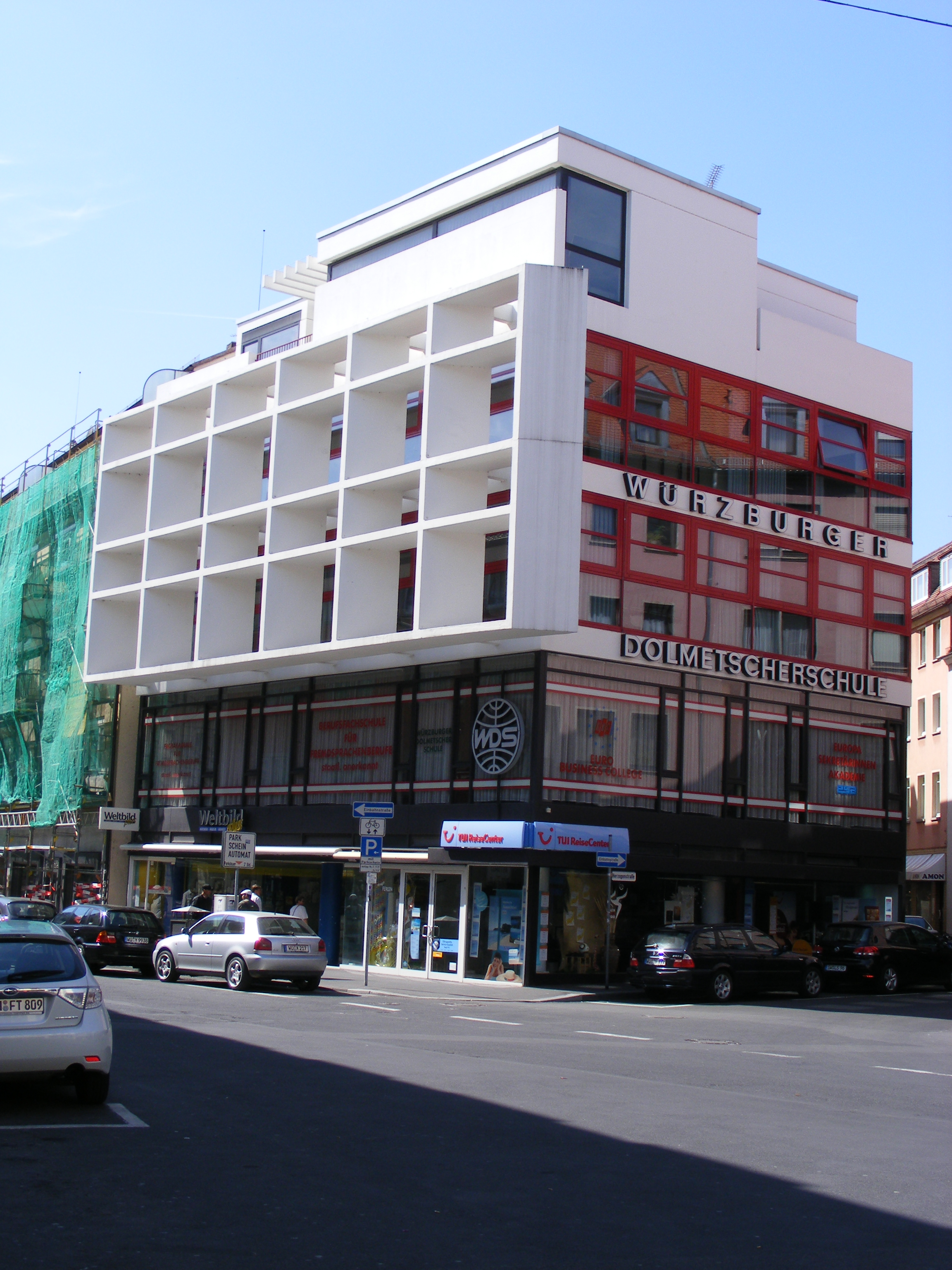 Würzburger Dolmetscherschule WDS (Außenansicht), Herzogenstraße 8, 97070 Würzburg